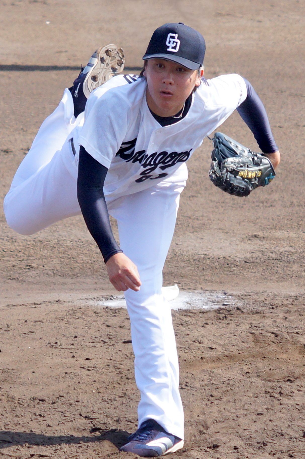 ナゴヤ球場